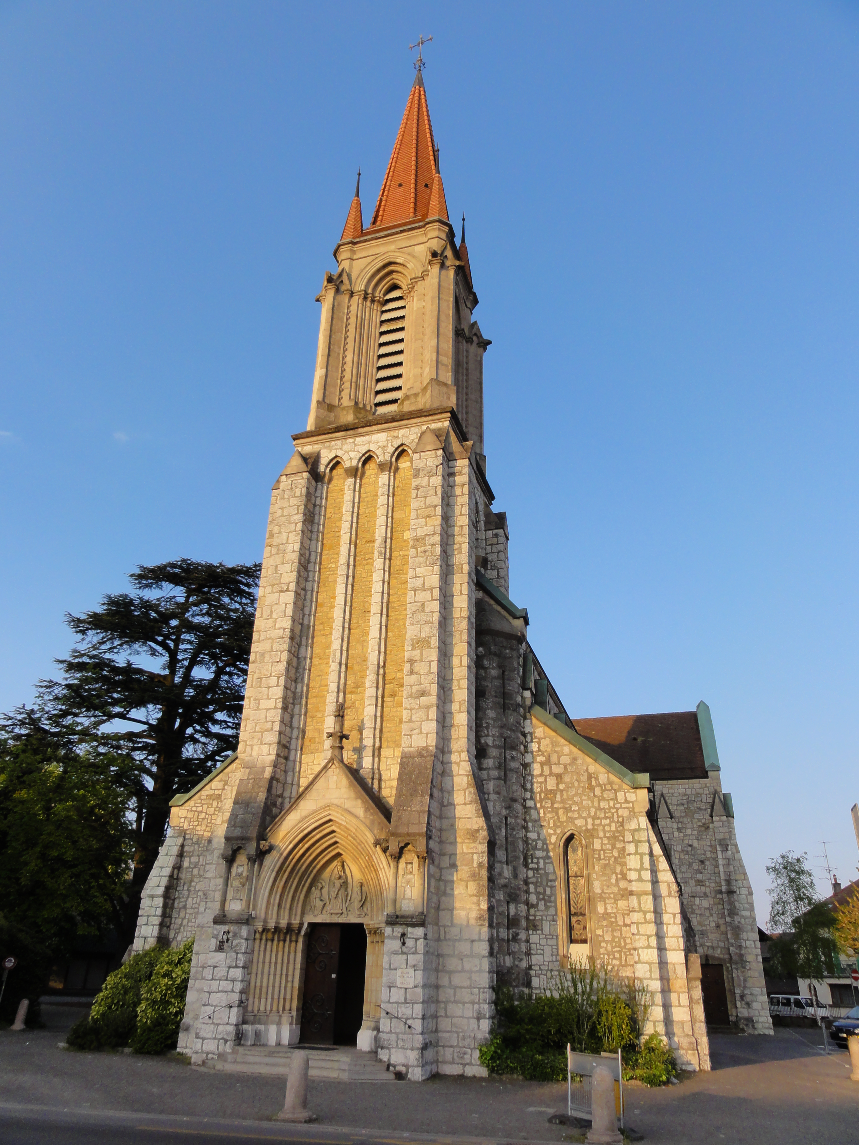 L’église Notre-Dame des Grâces Av. des Communes-Réunies 5 1212 Grand-Lancy